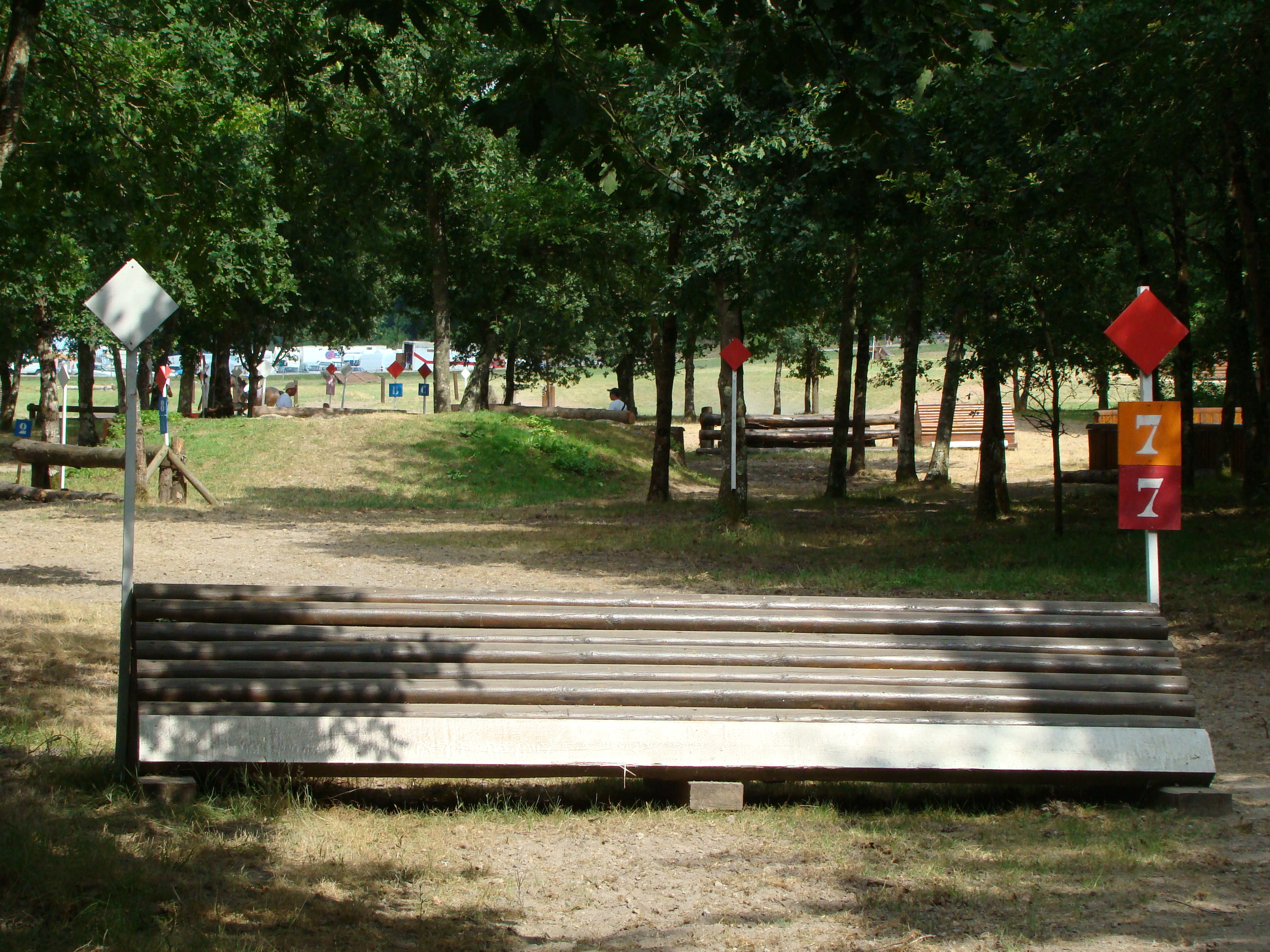 picture taken at 2008 generali opn de france 2008